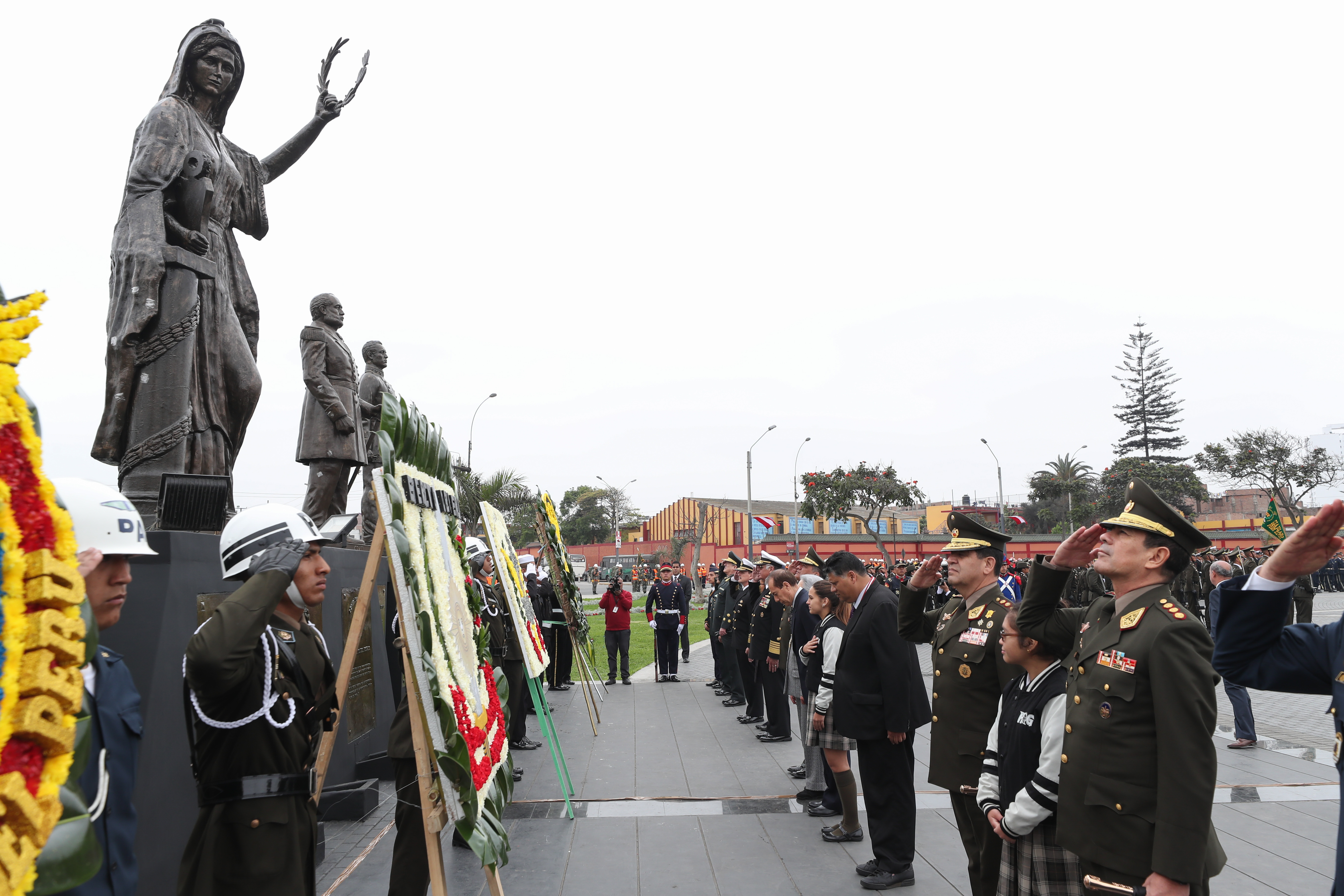 MINISTRO DE DEFENSA PRESIDIÓ CEREMONIA POR EL 199 ANIVERSARIO DE CREACIÓN DE LA PRIMERA BANDERA DEL PERÚ